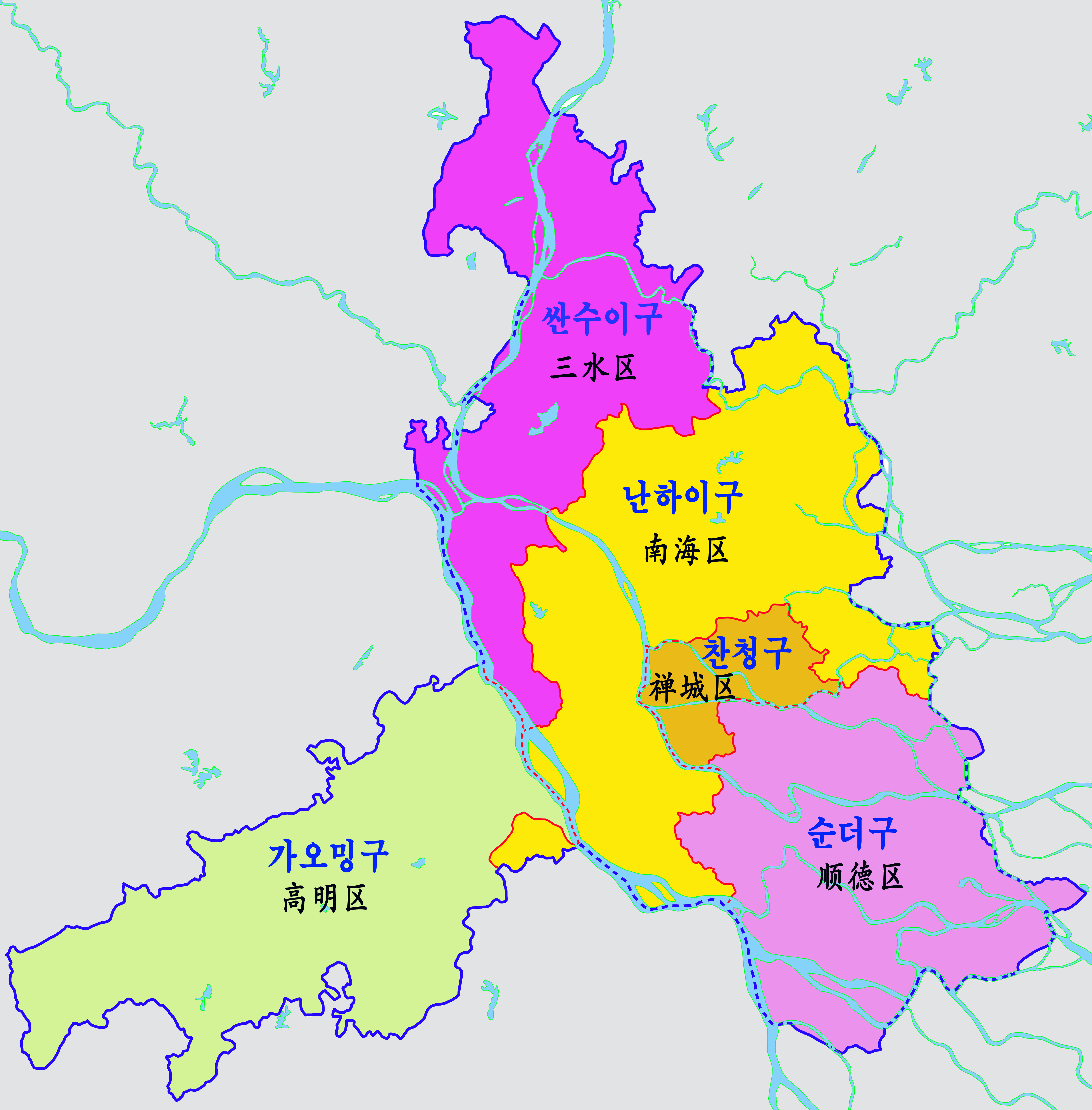 포산시지도